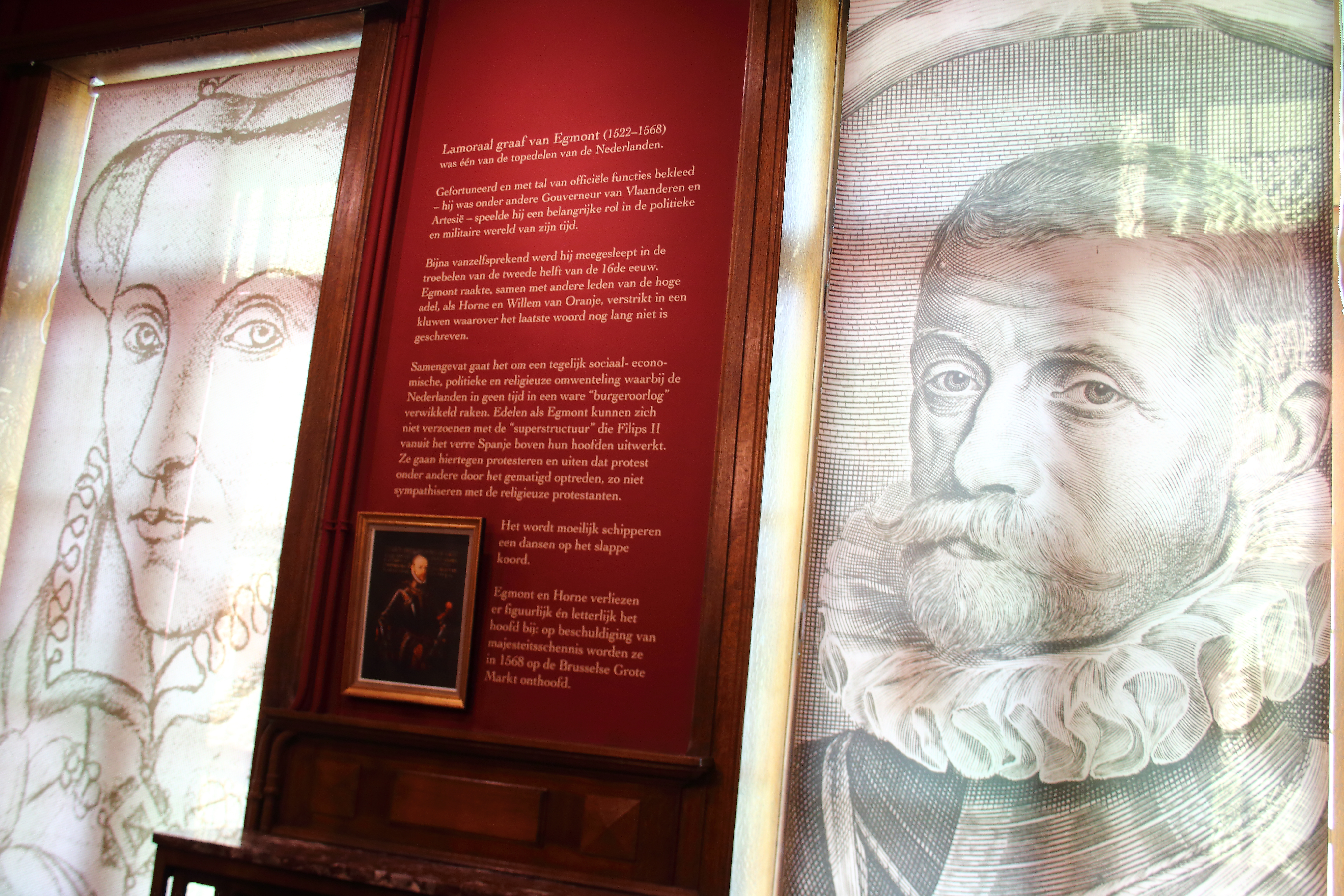 Egmontkamer, stadhuis Zottegem, Vlaanderen, België